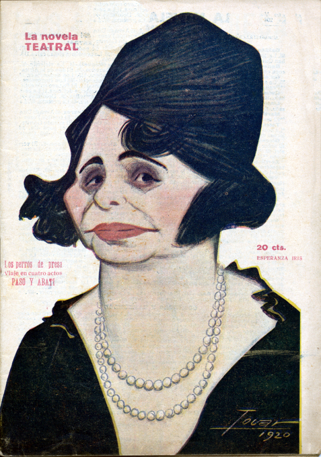 Caricatura de Esperanza Iris.